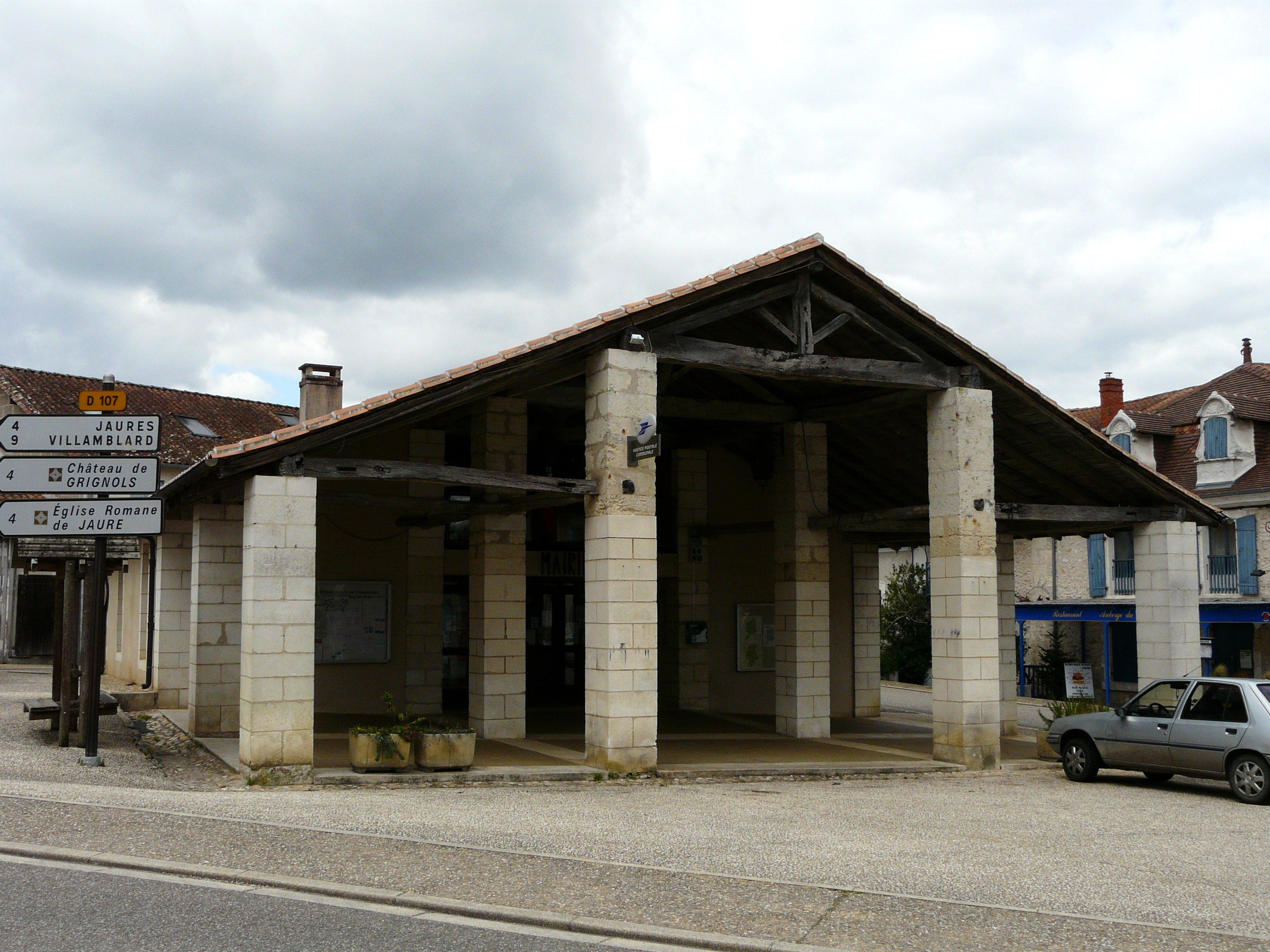 La mairie de Grignols, Dordogne, France.